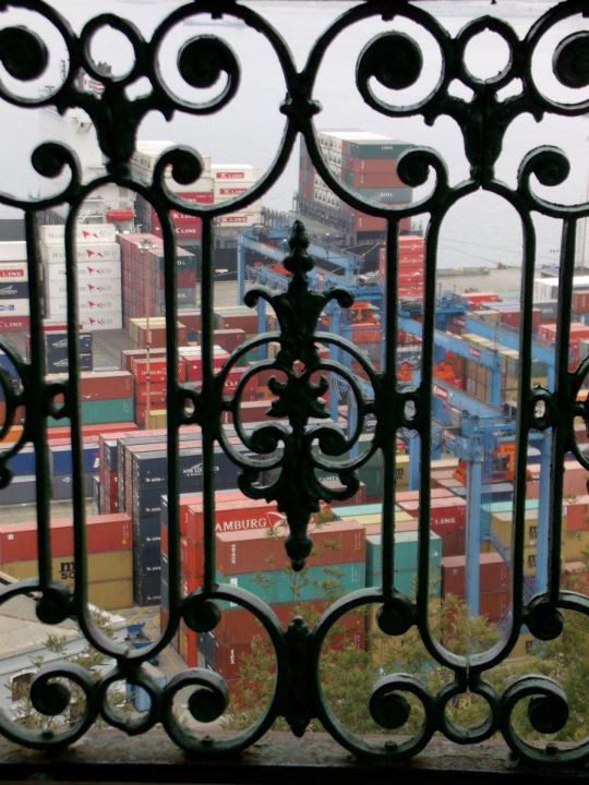 Valparaíso